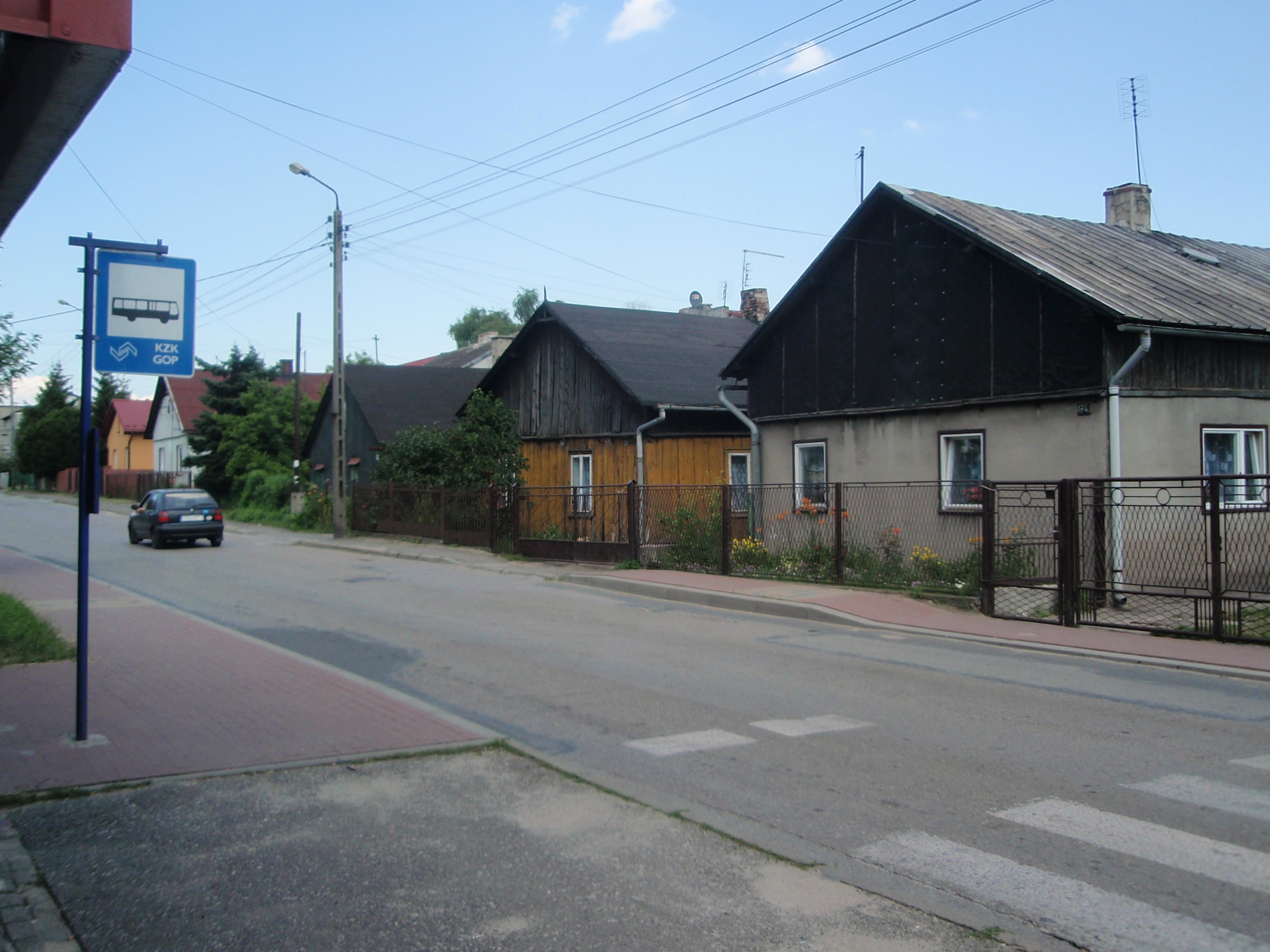 Ul. Główna w Dąbrowie Górniczej-Strzemieszycach Małych